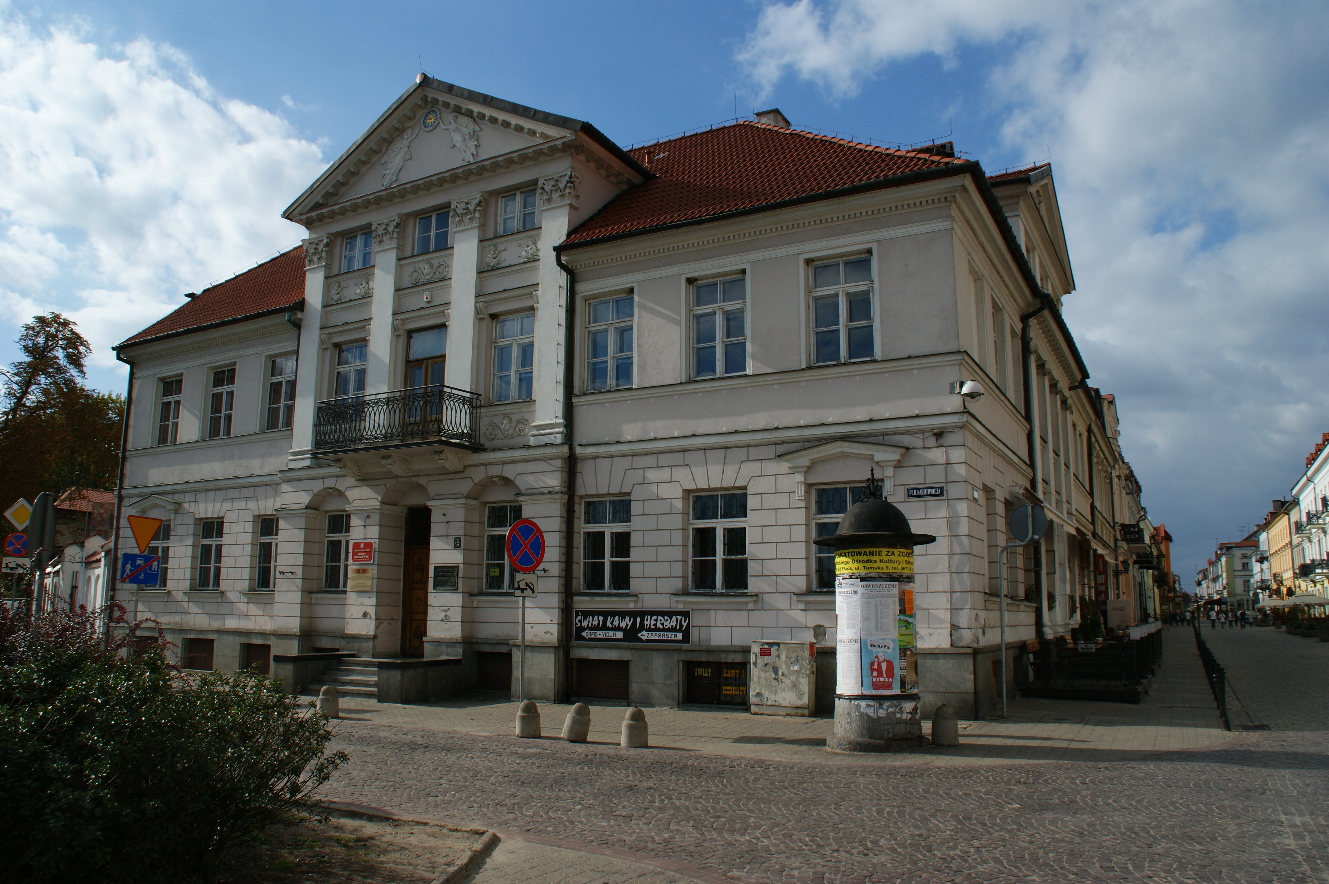 Płock, pl. Narutowicza 2 - "Dom pod Opatrznością", obecnie Biblioteka im. Zielińskich, mur., 1828-1852 (zabytek nr 159 z 20.01.1959)